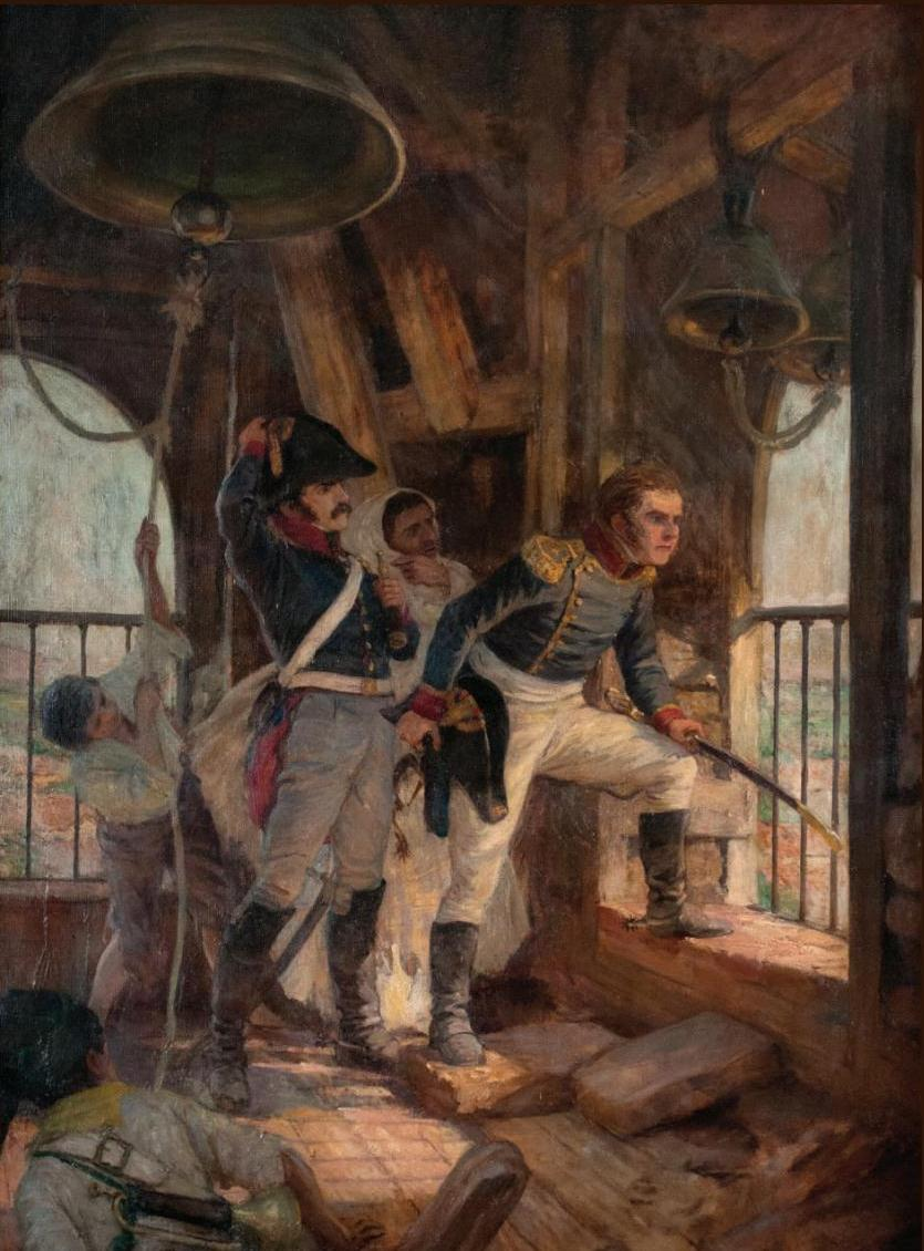 Bernardo O'Higgins, durante la batalla de Rancagua (2 de octubre de 1814), otea desde la torre de la Merced el avance de las tropas del General José Miguel Carrera.